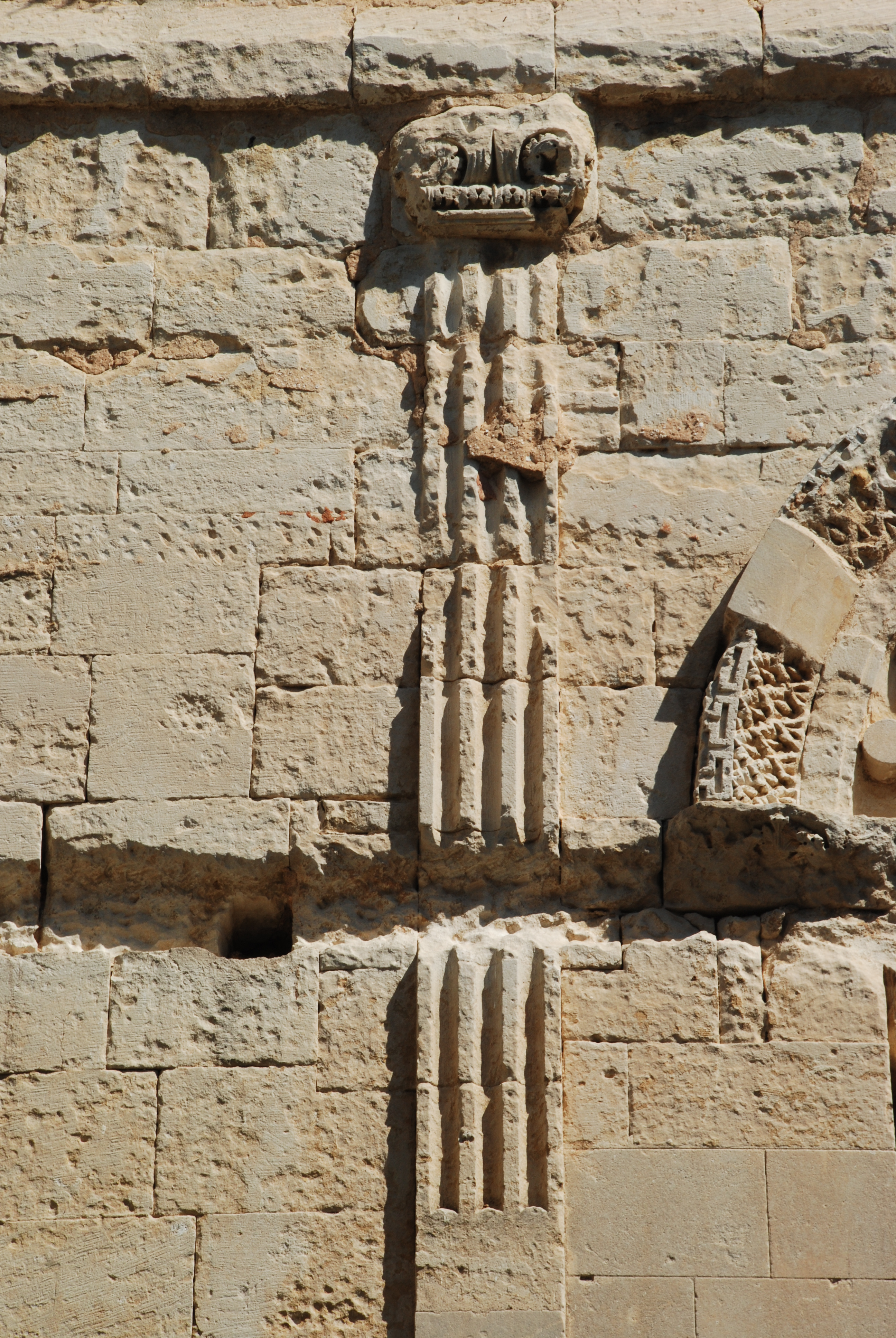 Cathédrale Notre-Dame de Saint-Paul-Trois-Châteaux